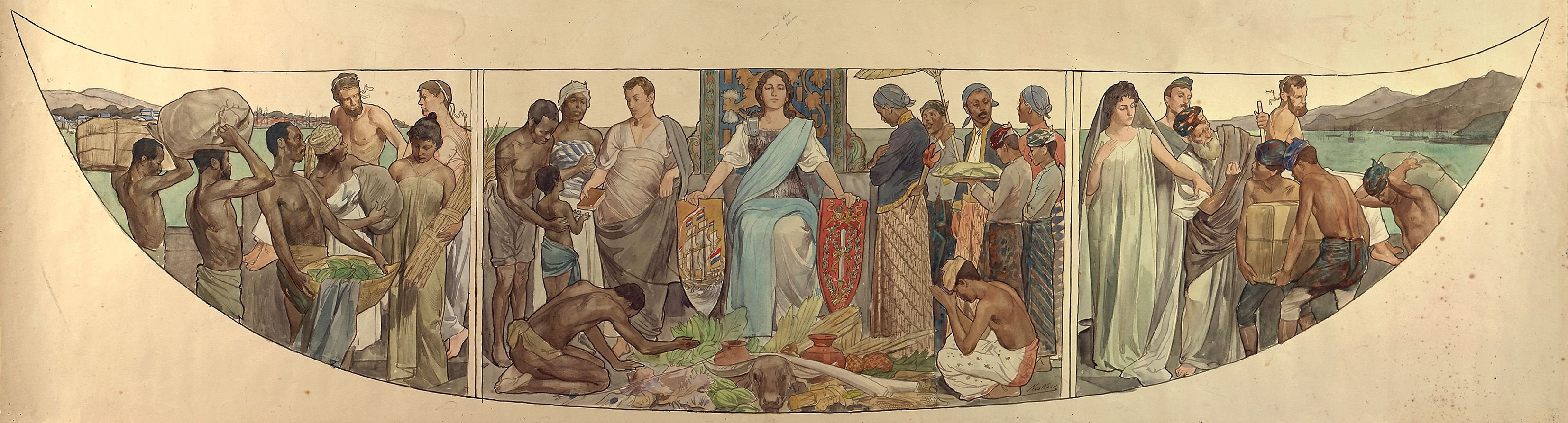 ontwerptekening voor paneel de hulde van de koloniën. Ontwerptekening door Nicolaas van der Waay voor de beschildering van de zijkant van de Gouden Koets, die samen met het andere zijpaneel het Heden verbeeldt. Producten en inwoners van de overzeese gebieden van het koninkrijk liggen aan de voeten van de Maagd.